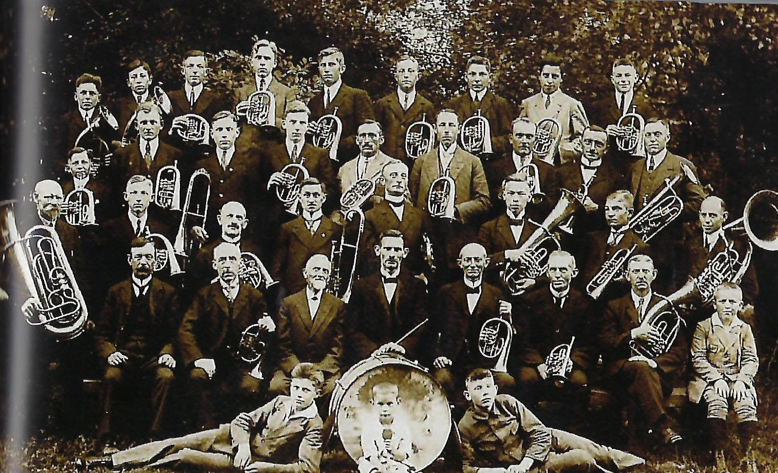 Karl Schwedhelm mit seinem Posaunenchor in Schneverdingen